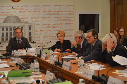 Єгор Соболєв Голова Комітету з питань запобігання та протидії корупції, 2016